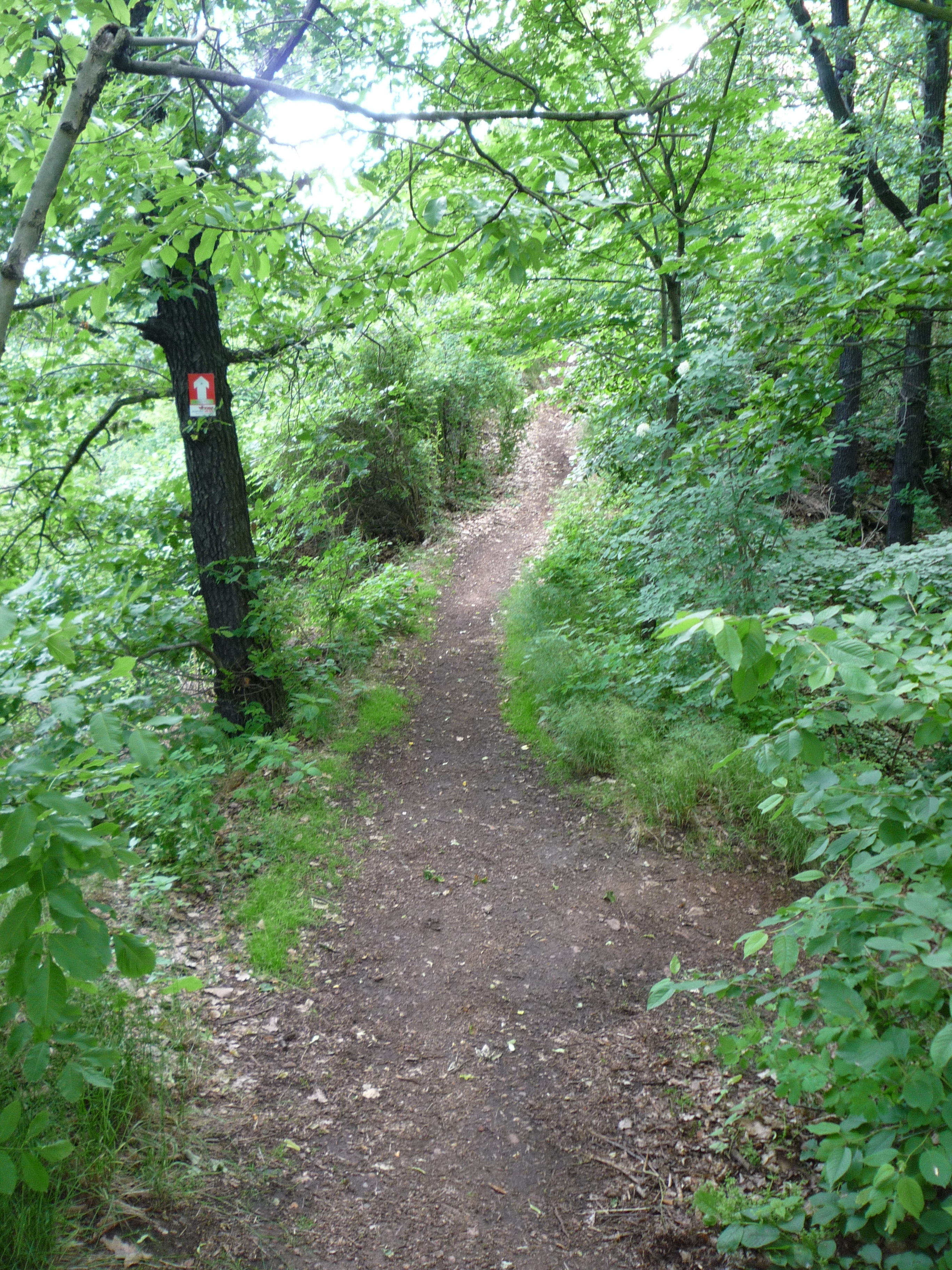 Weg zum Aussichtspunkt Bennokanzel, links und rechts abfallend, in der Bildmitte ist der Erddamm mit einer Trockenmauer gestützt